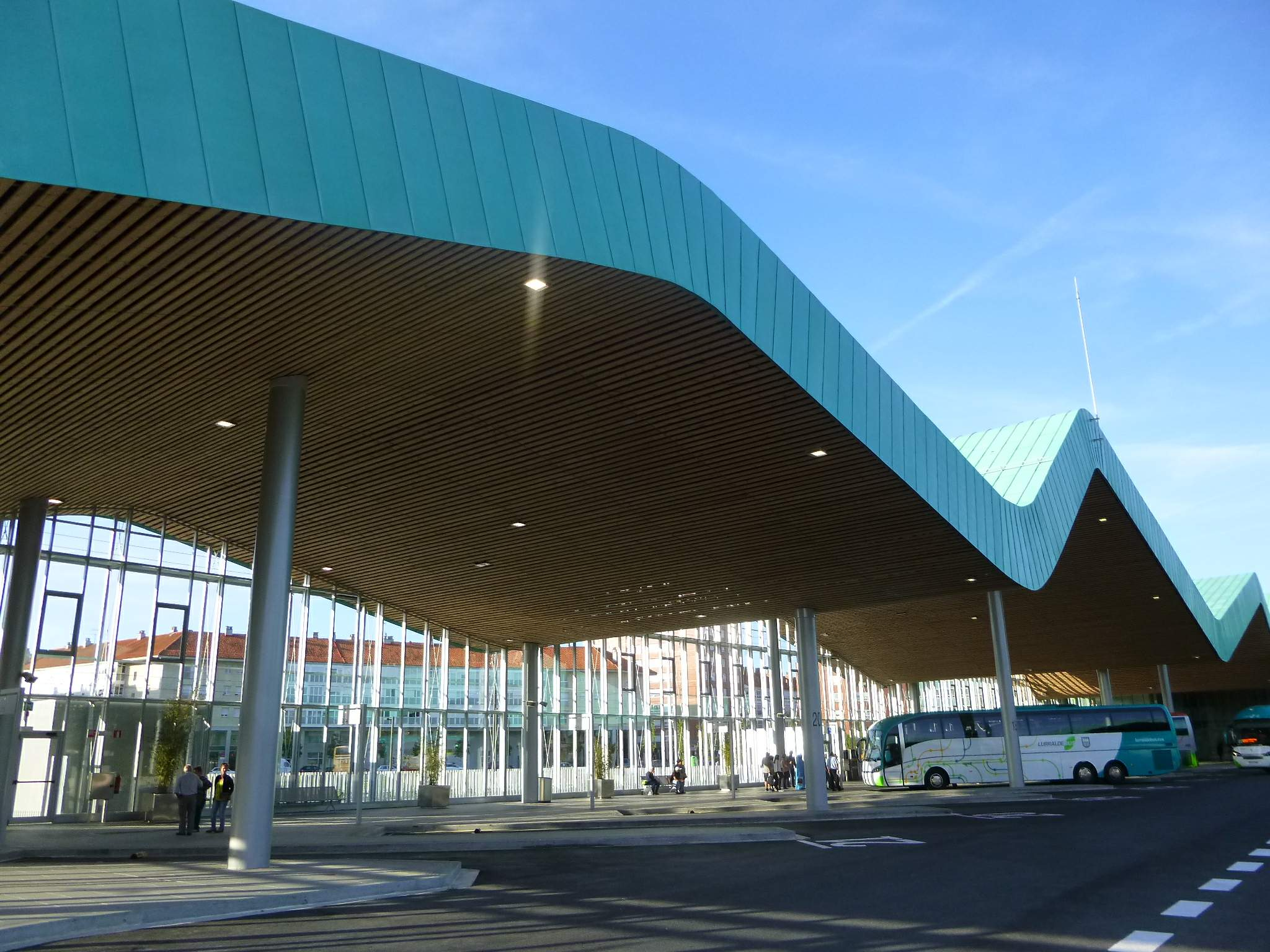 Estación de Autobuses de Vitoria (inaugurada en marzo de 2015)